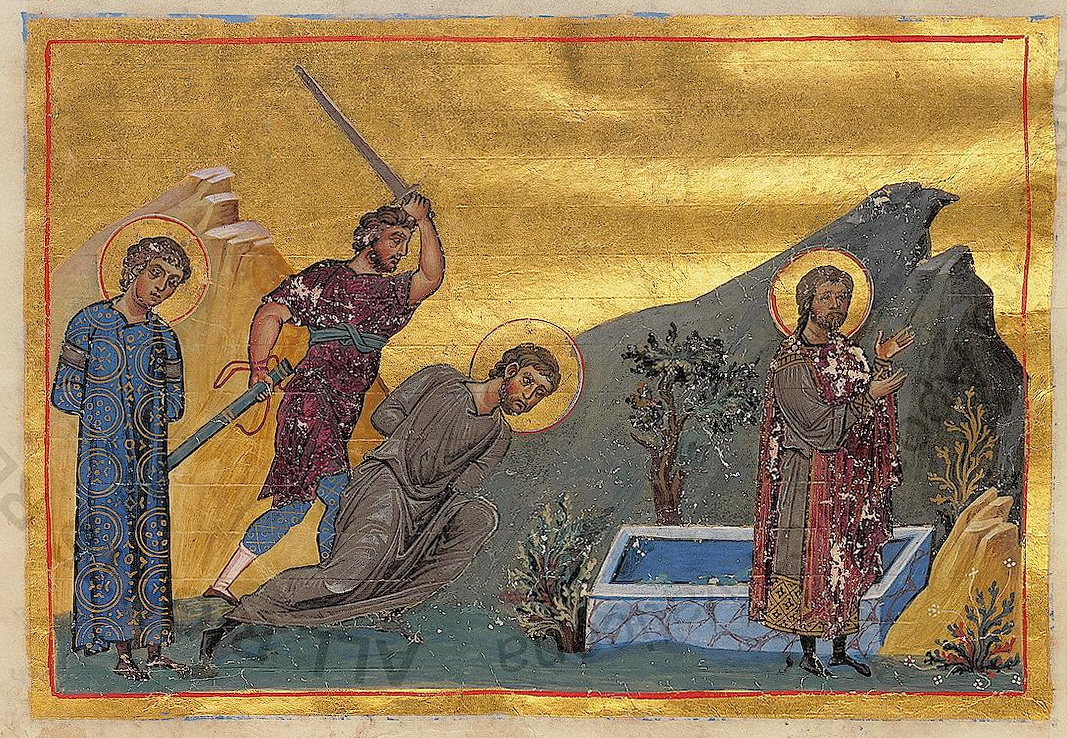 Константинополь. 985 г. Миниатюра Минология Василия II. Ватиканская библиотека. Рим.